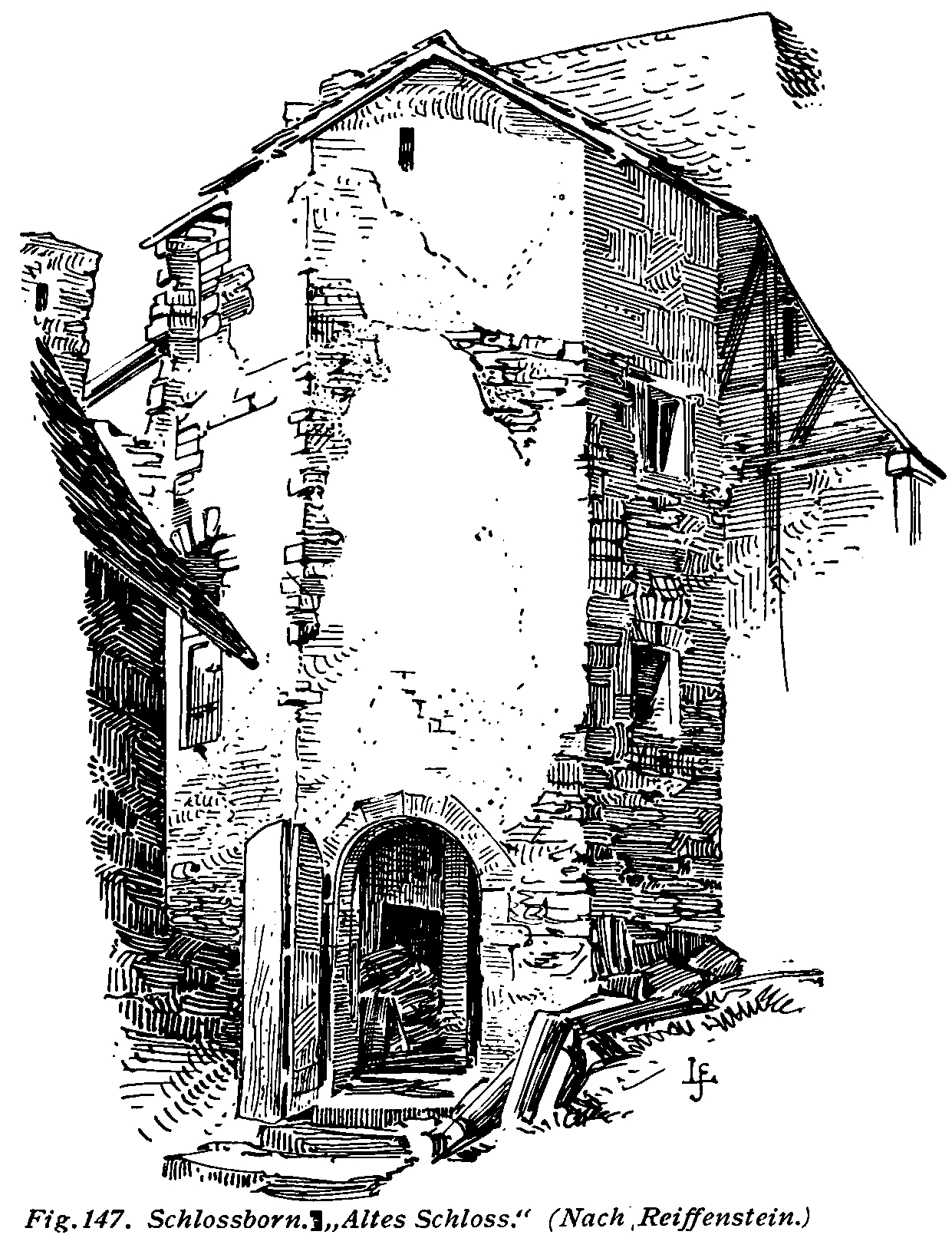 Schlossborn altes Schloss (nach Reiffenstein)